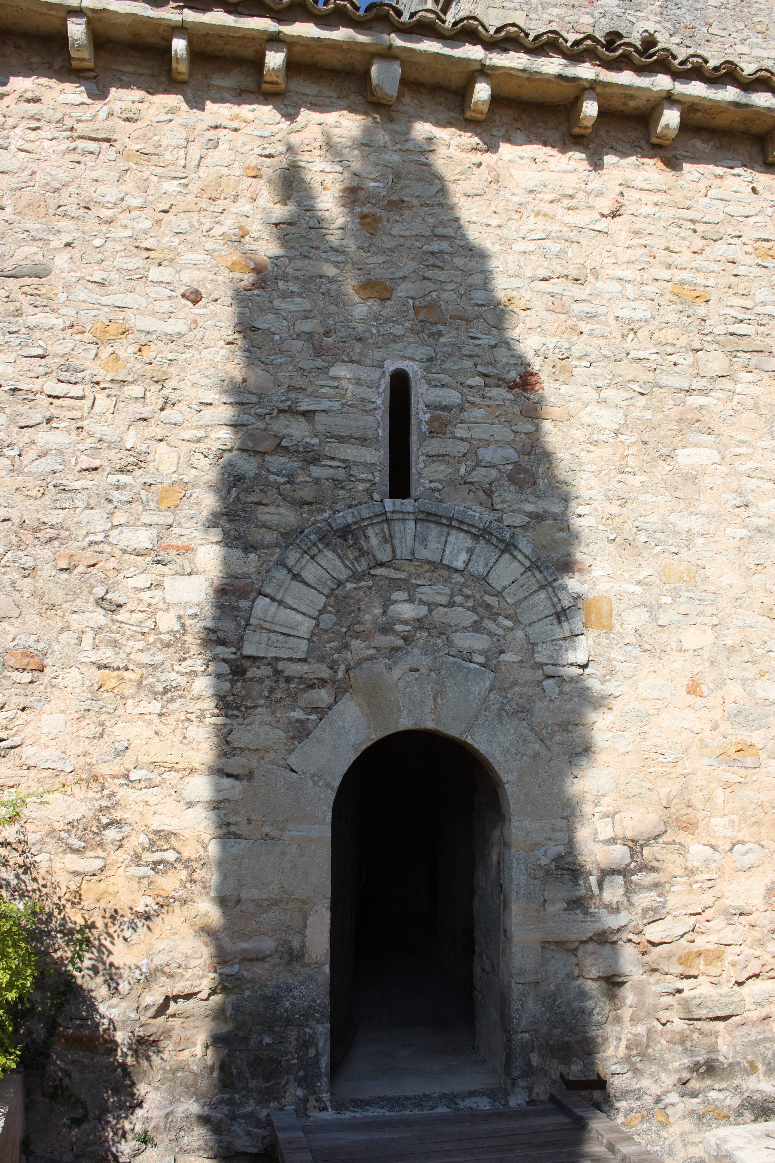 Romanische Kapelle Sainte-Madeleine in Bédoin, einer Gemeinde im Département Vaucluse in der französischen Region Provence-Alpes-Côte d’Azur, Portal an der Südseite